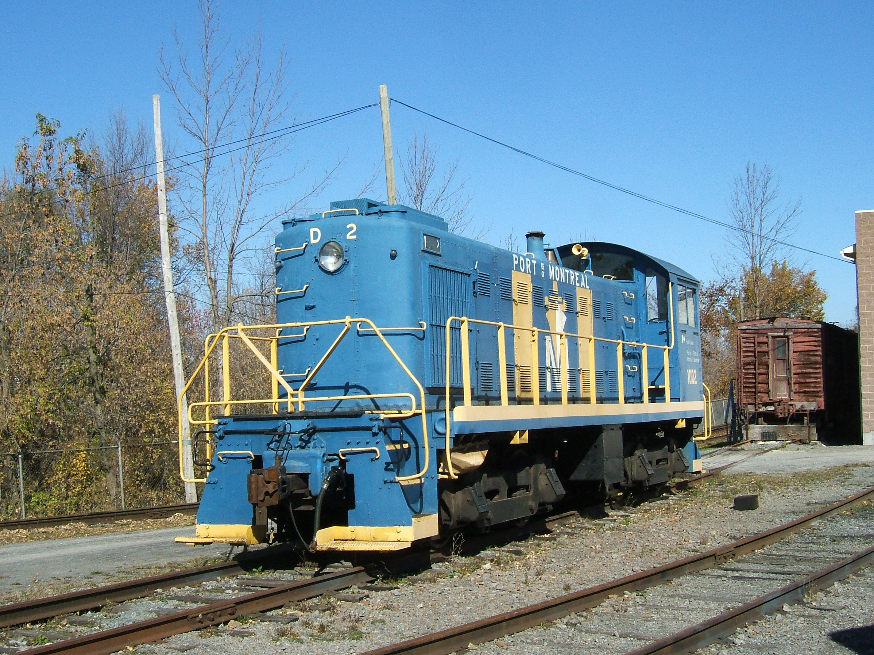 Canadian Railroad Museum, Saint-Constant, Québec